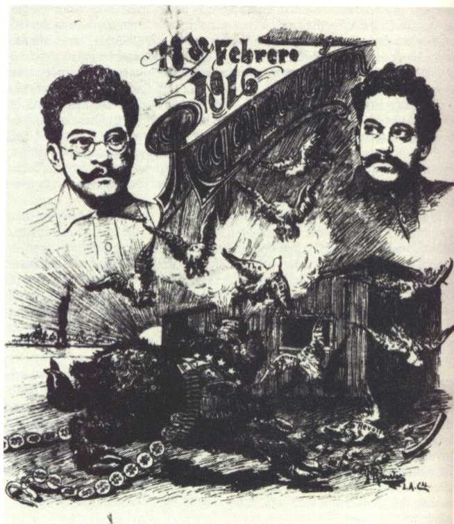 Grabado de Nicolás Reveles publicado en la portada del periódico Regeneración Tomo IV, No. 236. 29 de abril de 1916. El grabado alude a los hermanos Flores Magón que fueron detenidos en Los Ángeles el 18 de febrero de 1916 acusados de difamar a Venusatiano Carranza a través de Regeneración.